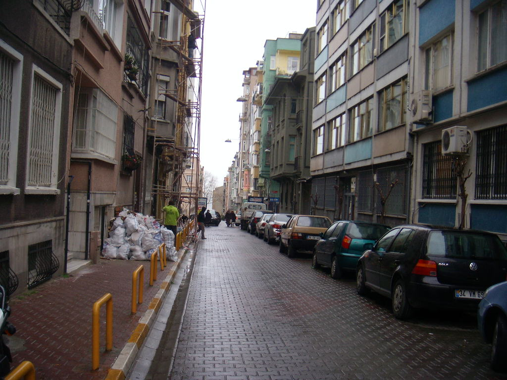 Kapıcılar Kralı Filmi'nin çekildiği Cihangir Güneşli Sokak